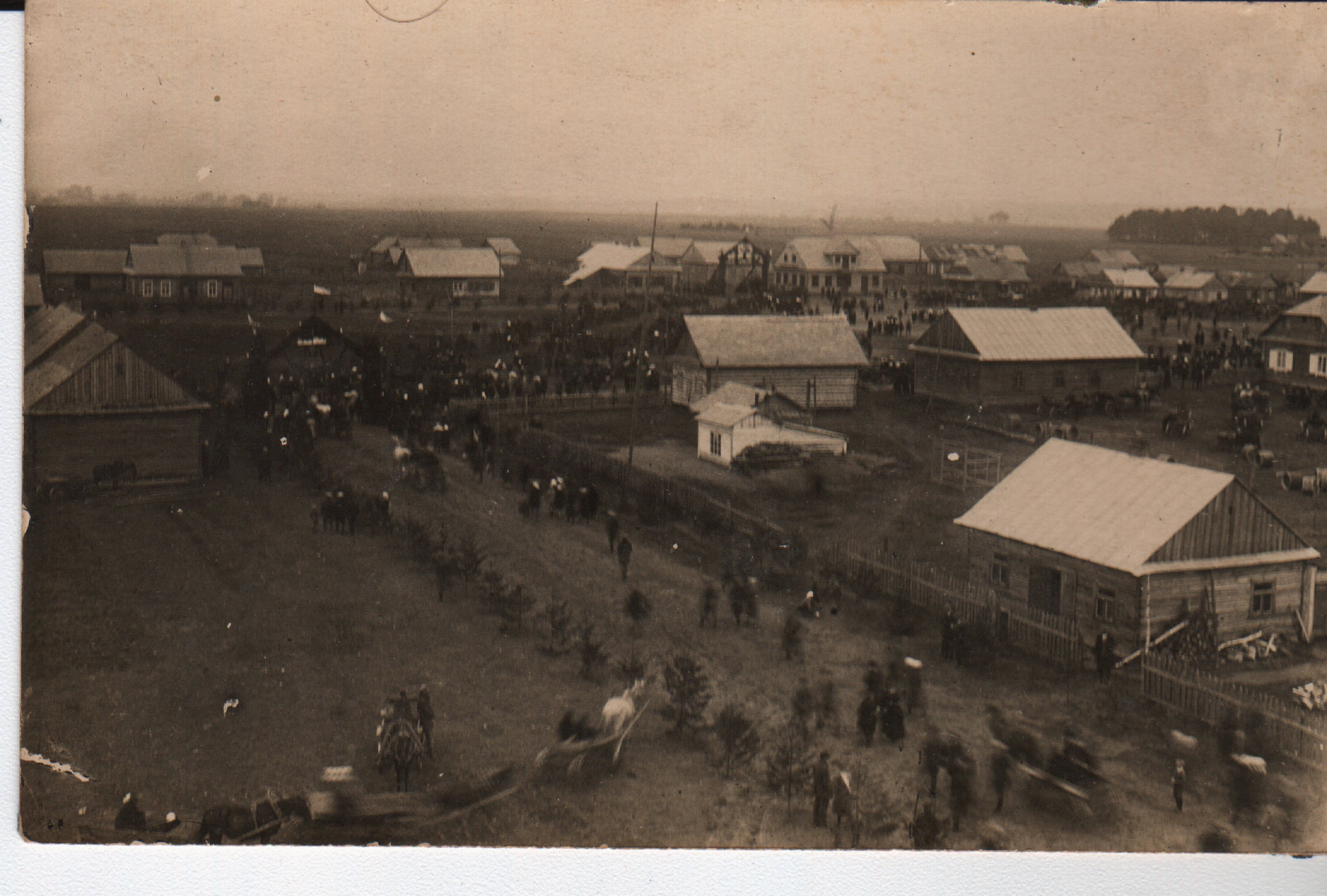 Беларуская (тарашкевіца): Заастравечча (Zaastraviečča)